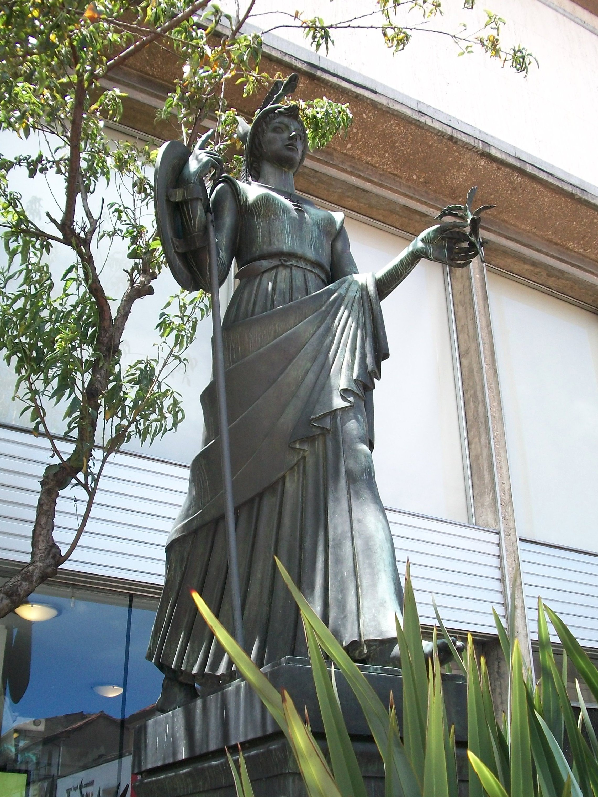 "Monumento a Minerva" de Vico Consorti. Entrada principal, biblioteca Luis Ángel Arango. Carrera 4, calle 11. Bogotá